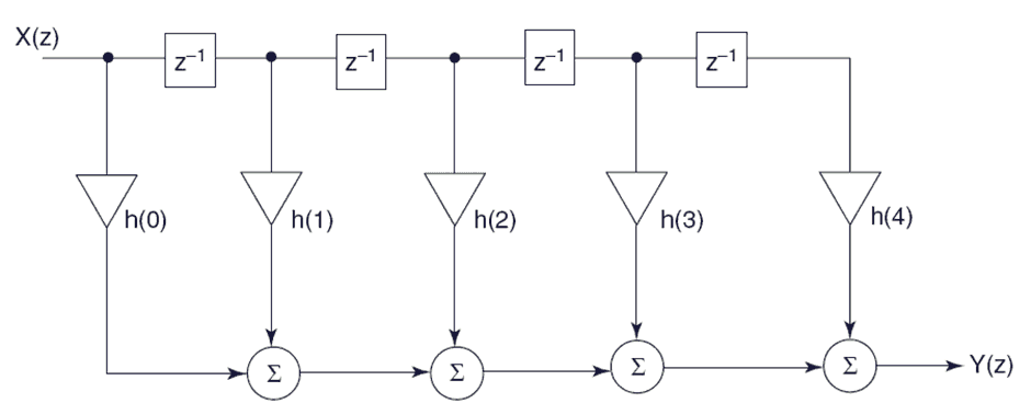 FIR Filterstruktur, kanonische Normalform 1, (Direct Form 1, DF1)